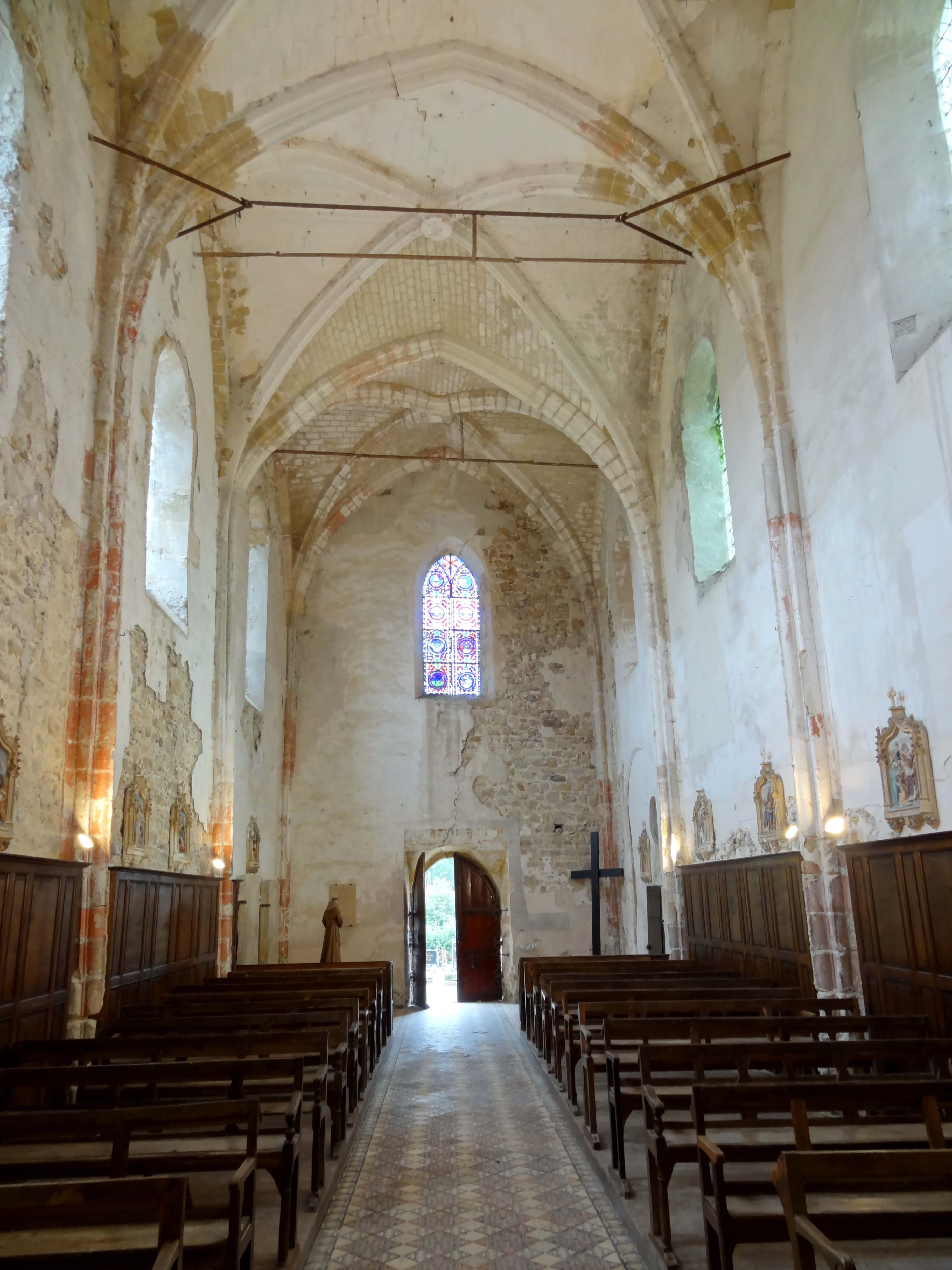 Intérieur de l'église - voir titre.